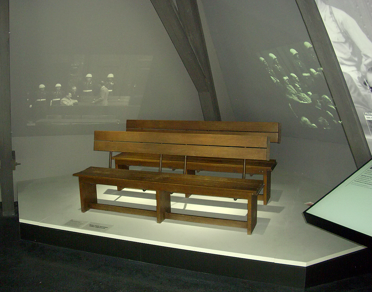 Teil der Anklagebank des Nürnberger Prozesses gegen die Hauptkriegsverbrecher.